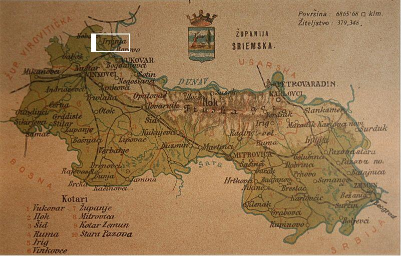 Zemljovidi županija na razglednicama oko 1900. godine